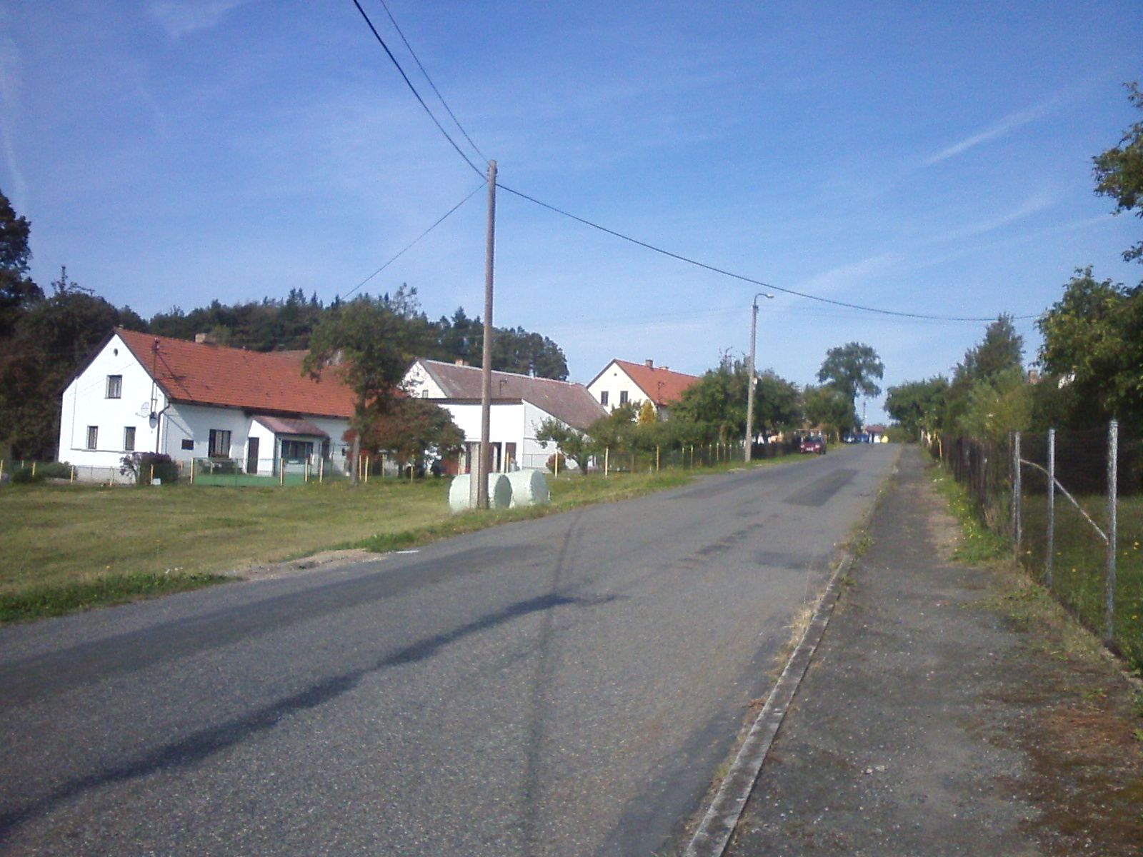 Vesnice od Maršovic